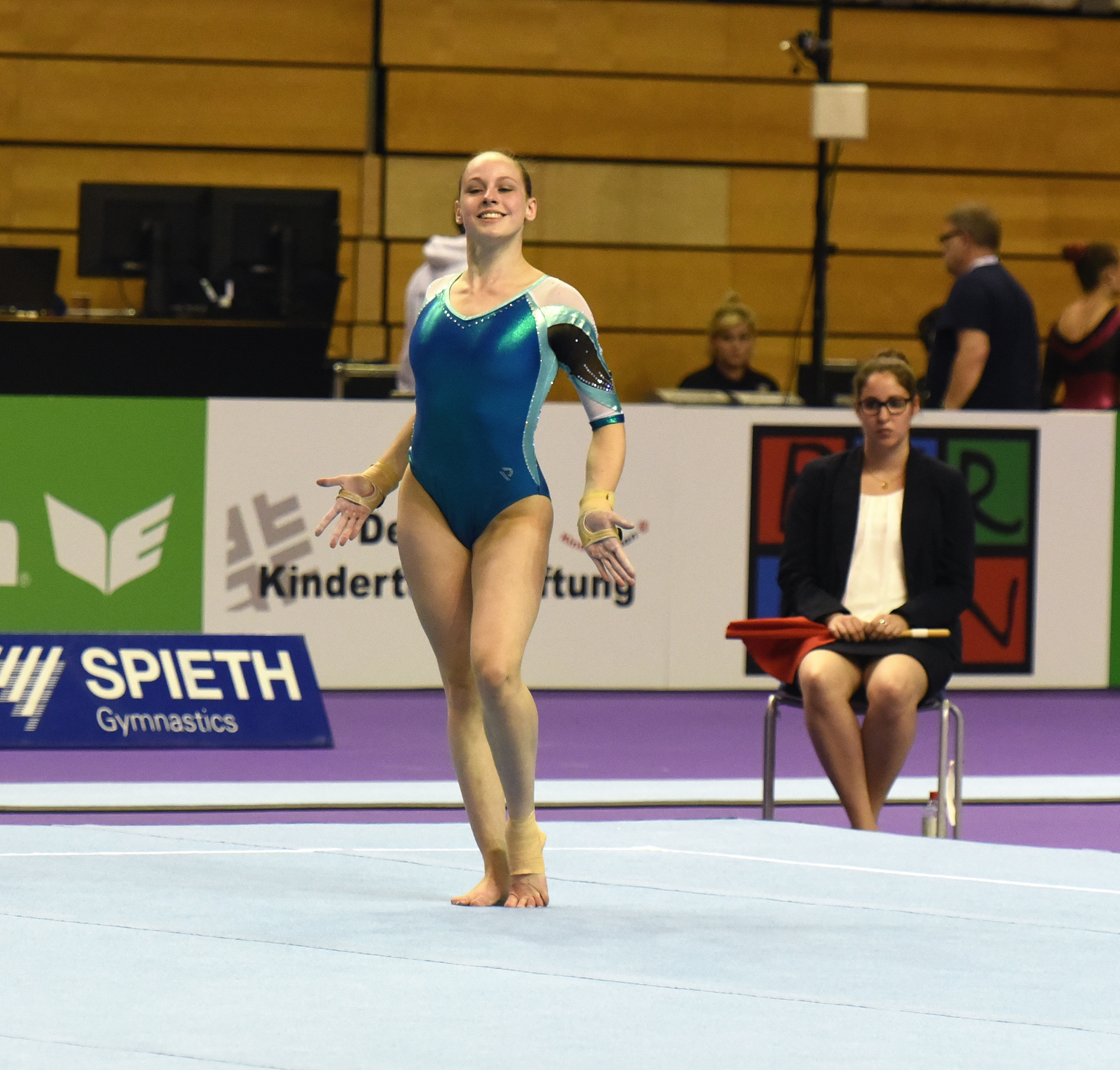 Deutsche Meisterschaften Gerätturnen Mehrkampf weiblich Wettkampf beim Internationalen Deutschen Turnfest Berlin 2017. Abgebildet ist Sarah Voss.